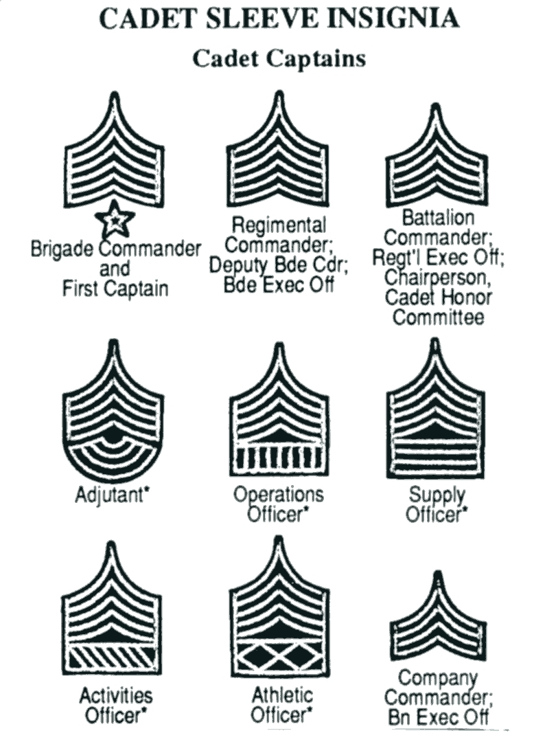 USMA Cadet Rank #1